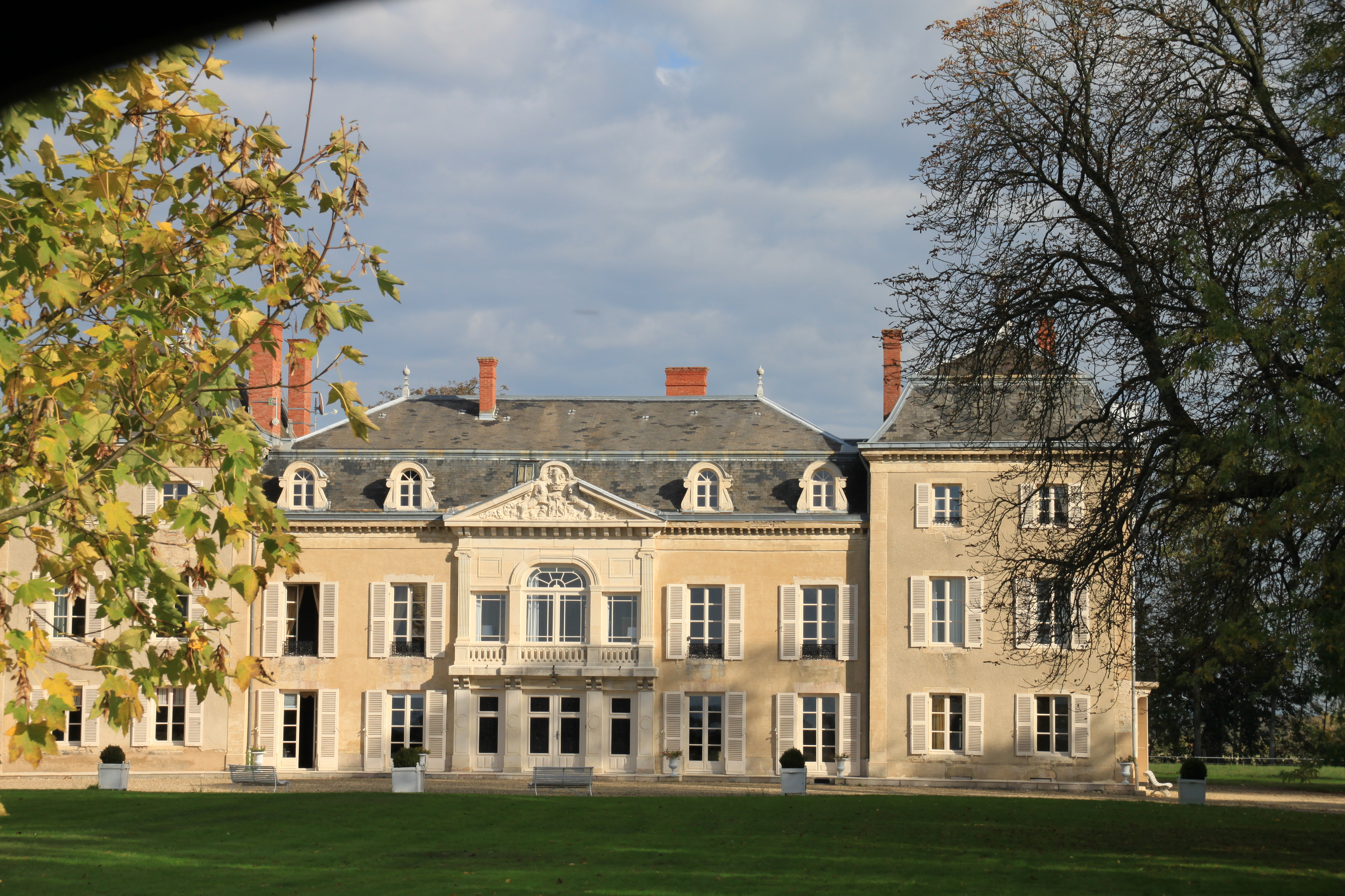 Schloss von Varennes, im Besitz der Familie de Truchis